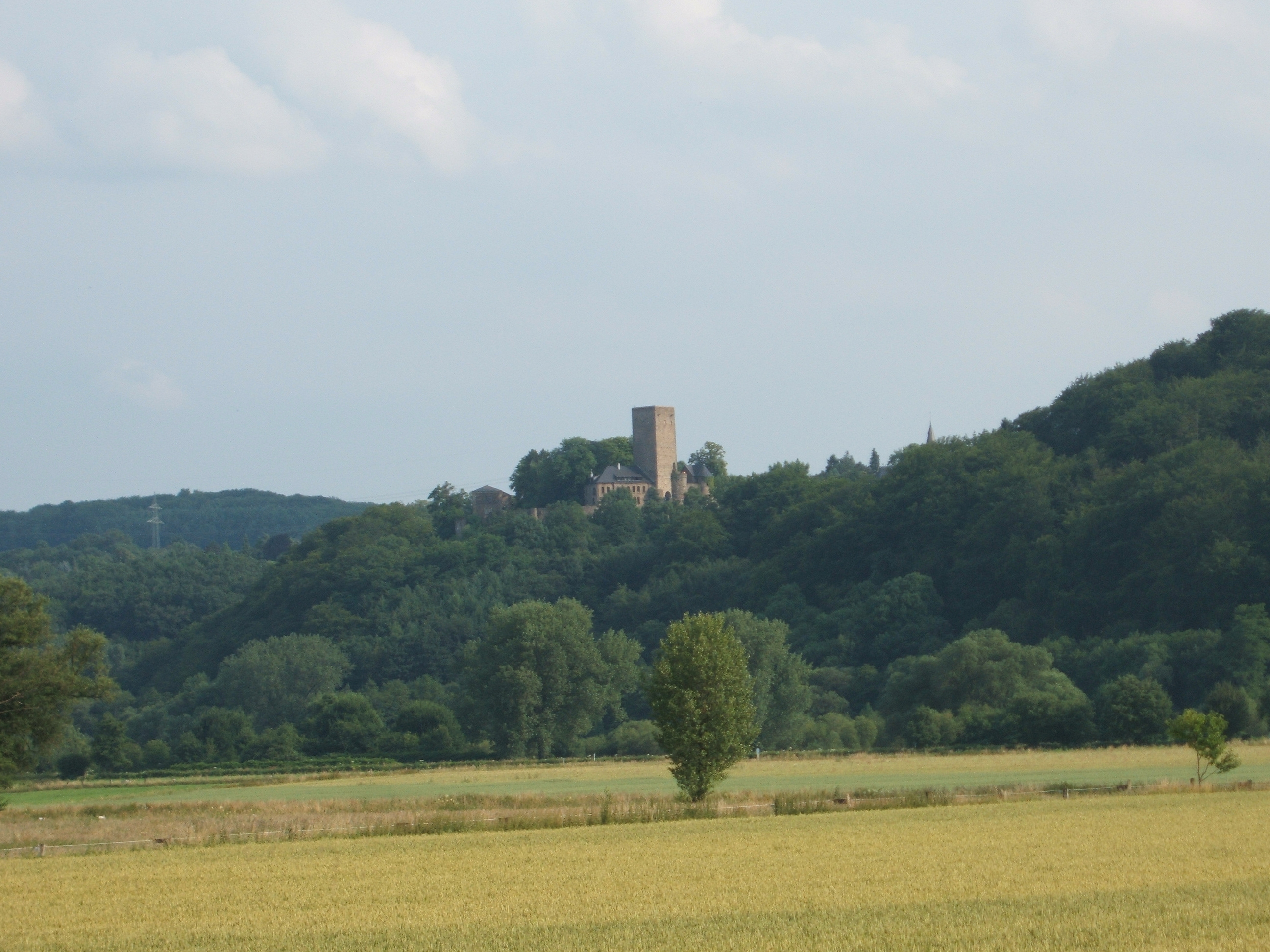 Burg Blankenstein, Hattingen